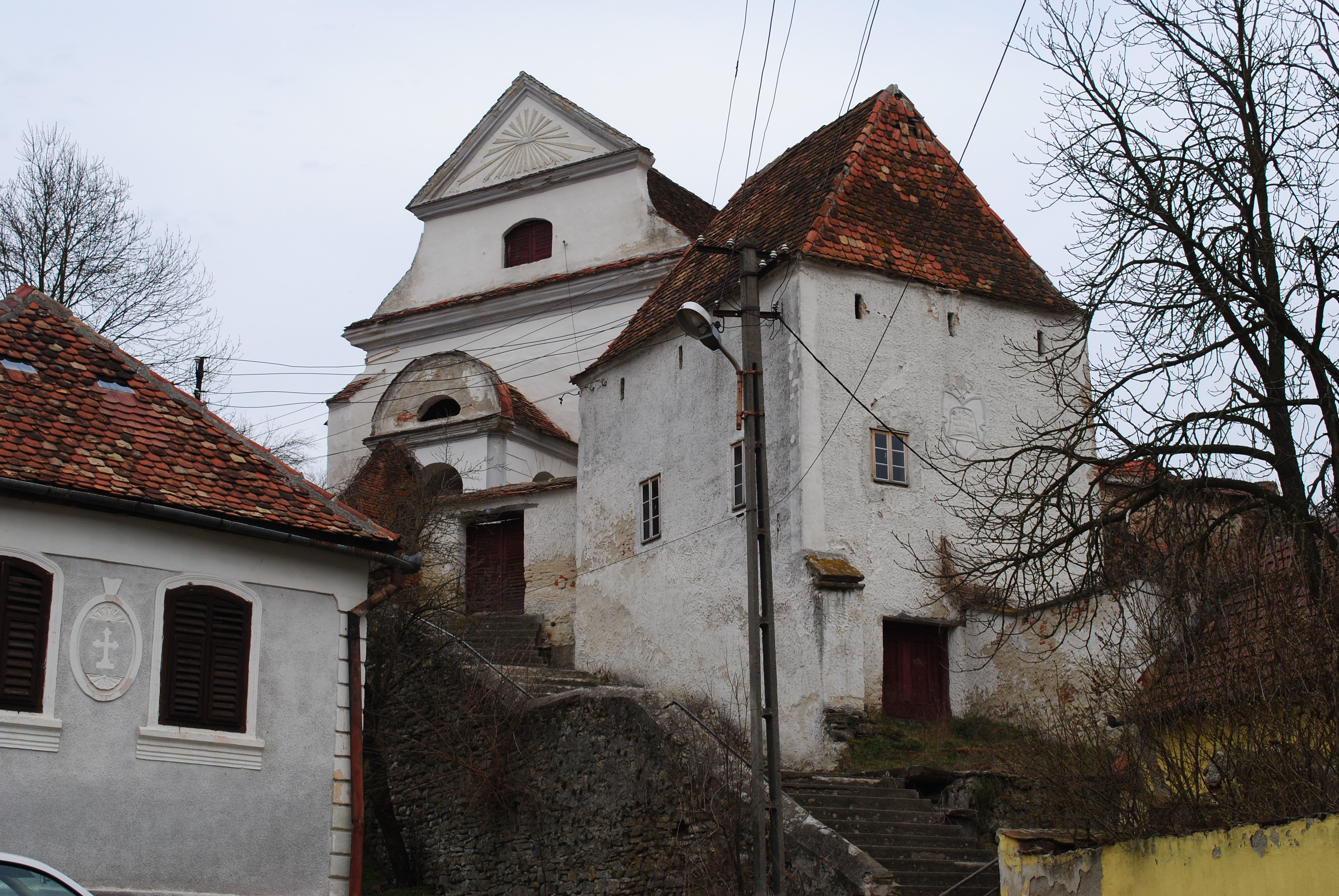 Ansamblul bisericii evanghelice fortificate, sf. sec. XV - sec. XIX